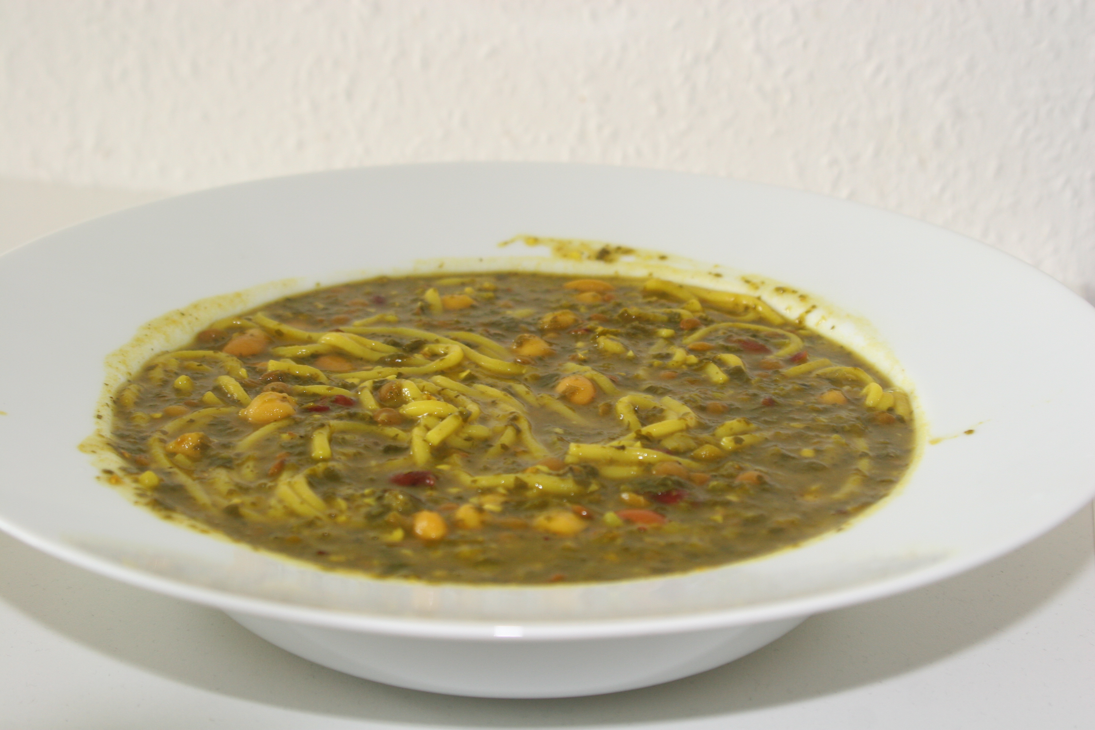 Den iranske tykflydende suppe Ash Reshteh består hovedsagelig af kryddeurter, bønner, linser og nudeler.